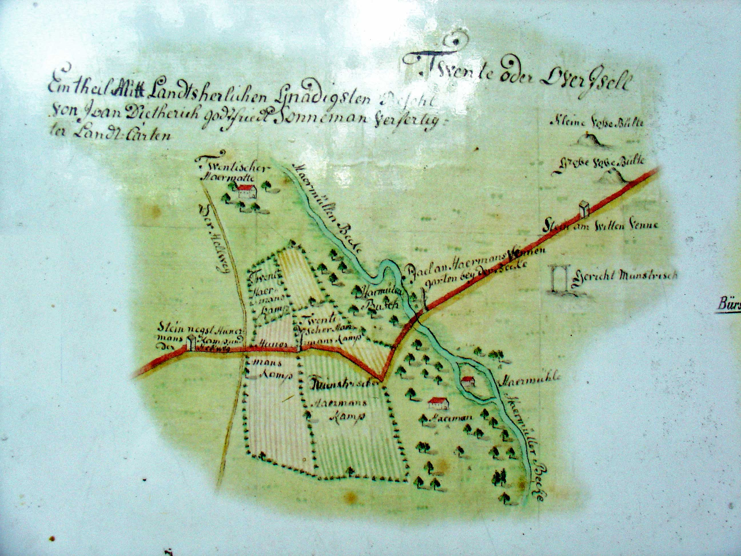 oude kaart van de omgeving Haarmühle met molen en galg ingetekend